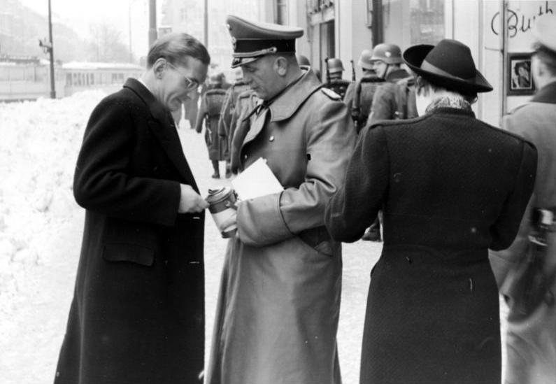 Tag der deutschen Polizei 1939, Generalmajor Arthur Mülverstedt (Genearlinspekteur der Schutzpolizei des Reiches) sammelt